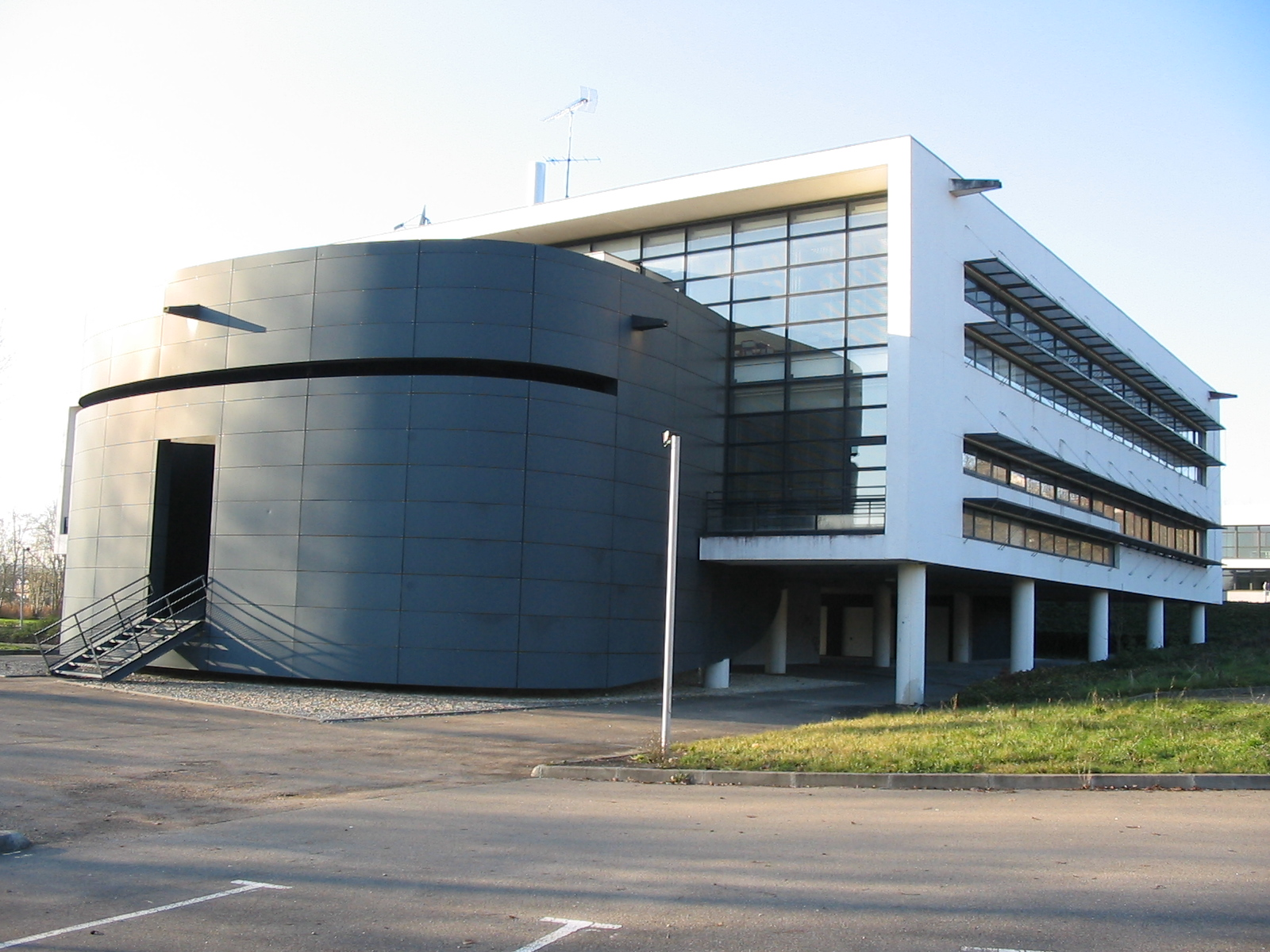 IUT Université